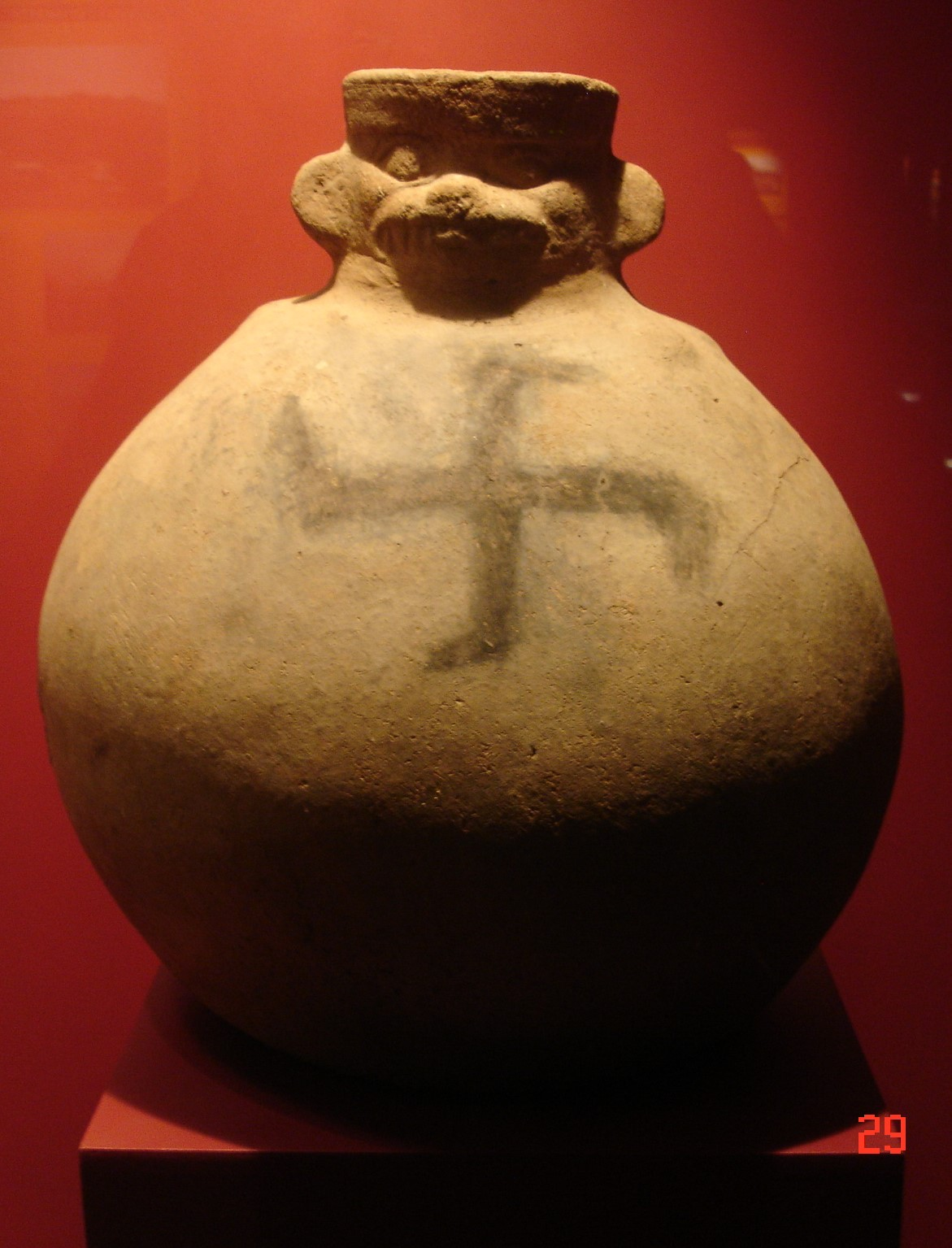 Esvástica en una vasija de la cultura moche.